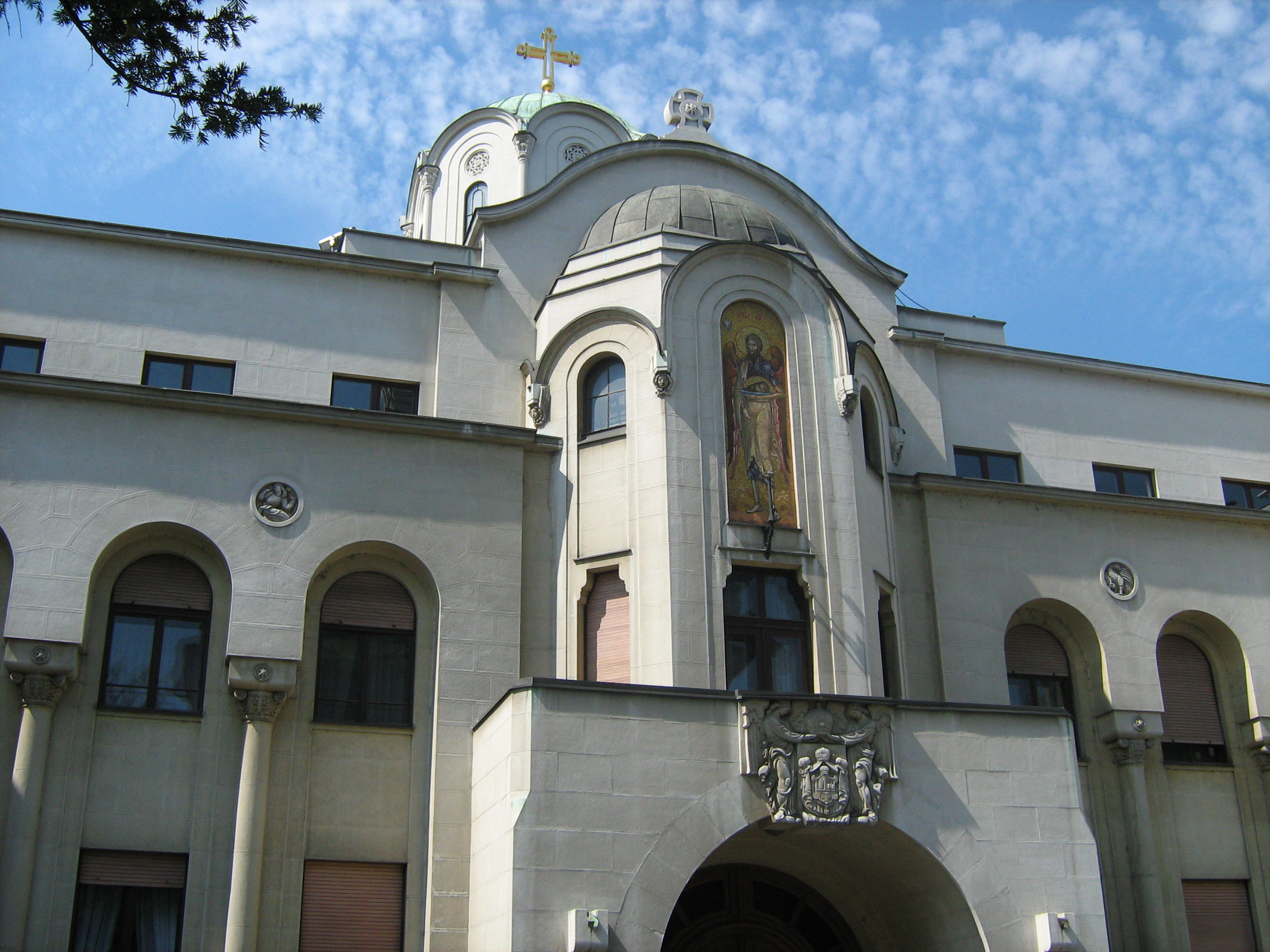 Зграда патријаршије у Београду